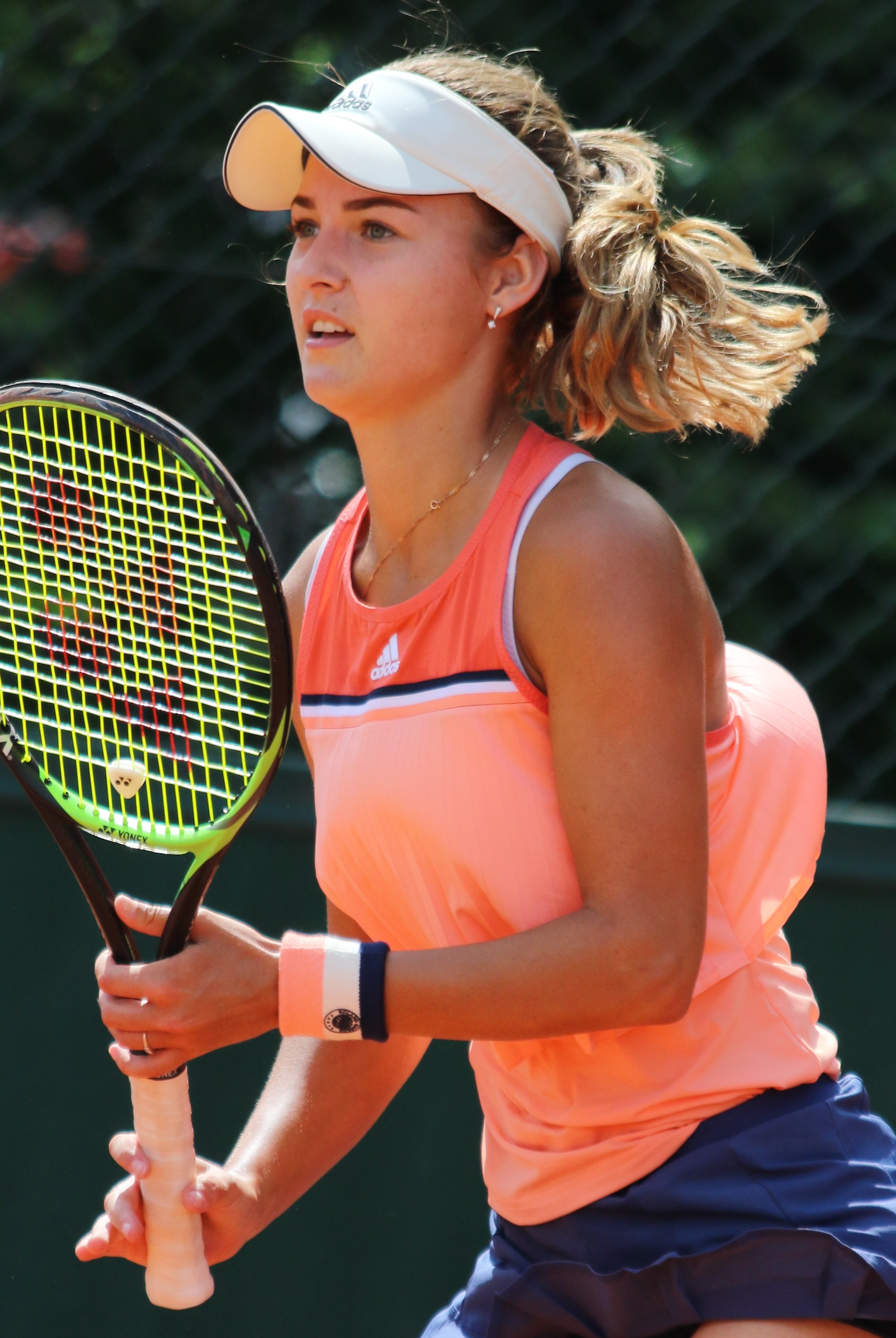 Kalinskaya RG18 (33)